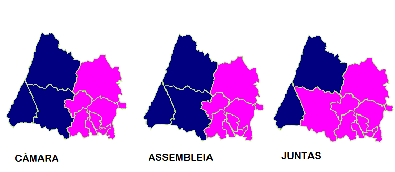 Mapa ilustrativo do partido mais votado por freguesia em Sintra (2017)